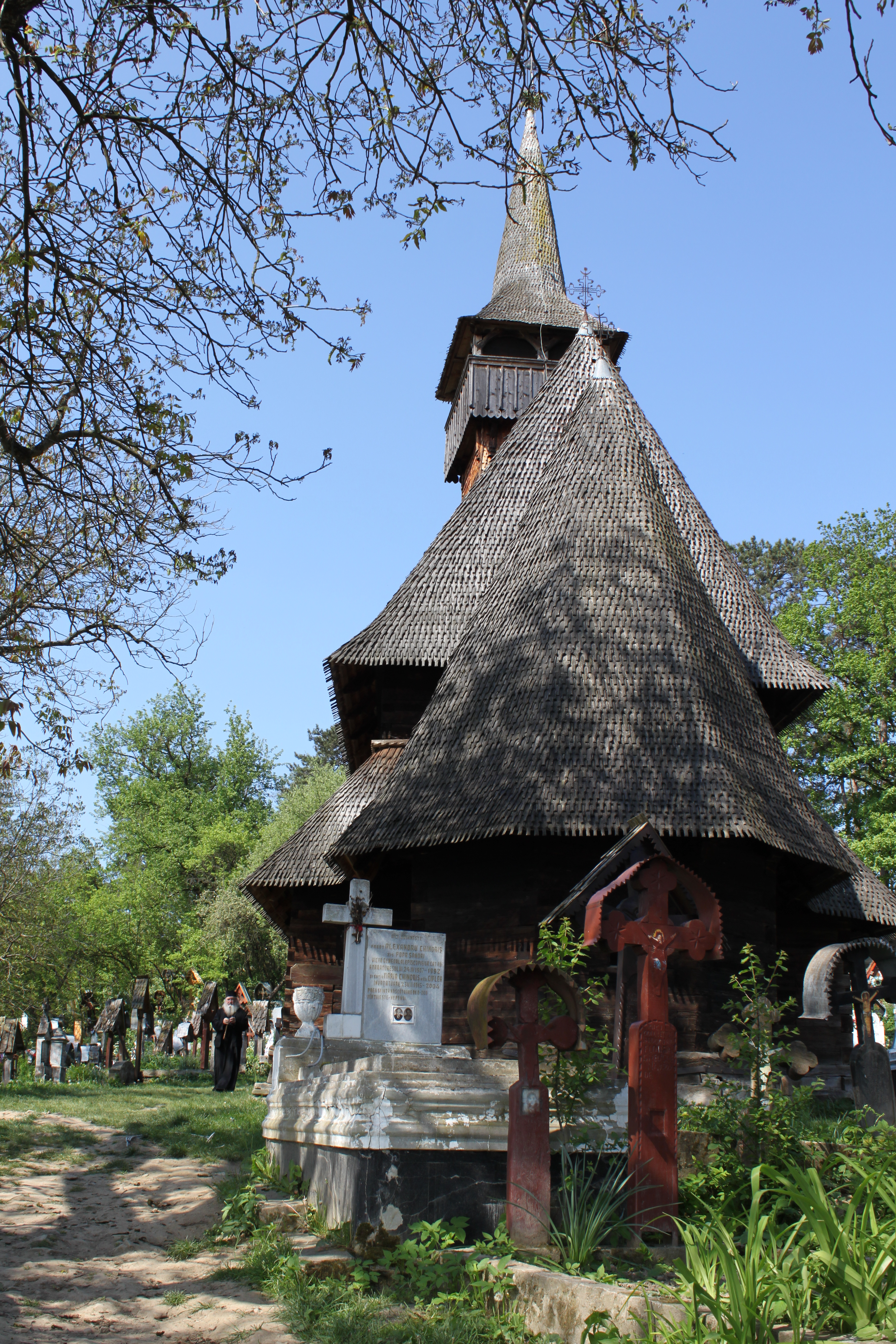 Biserică de lemn 01